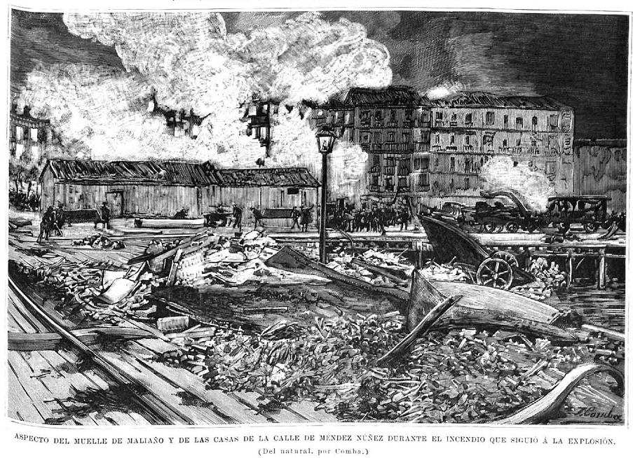 Aspecto del muelle de Maliaño y de las casas de la calle de Méndez Núñez durante el incendio que siguió a la explosión, en la revista española La Ilustración Española y Americana.